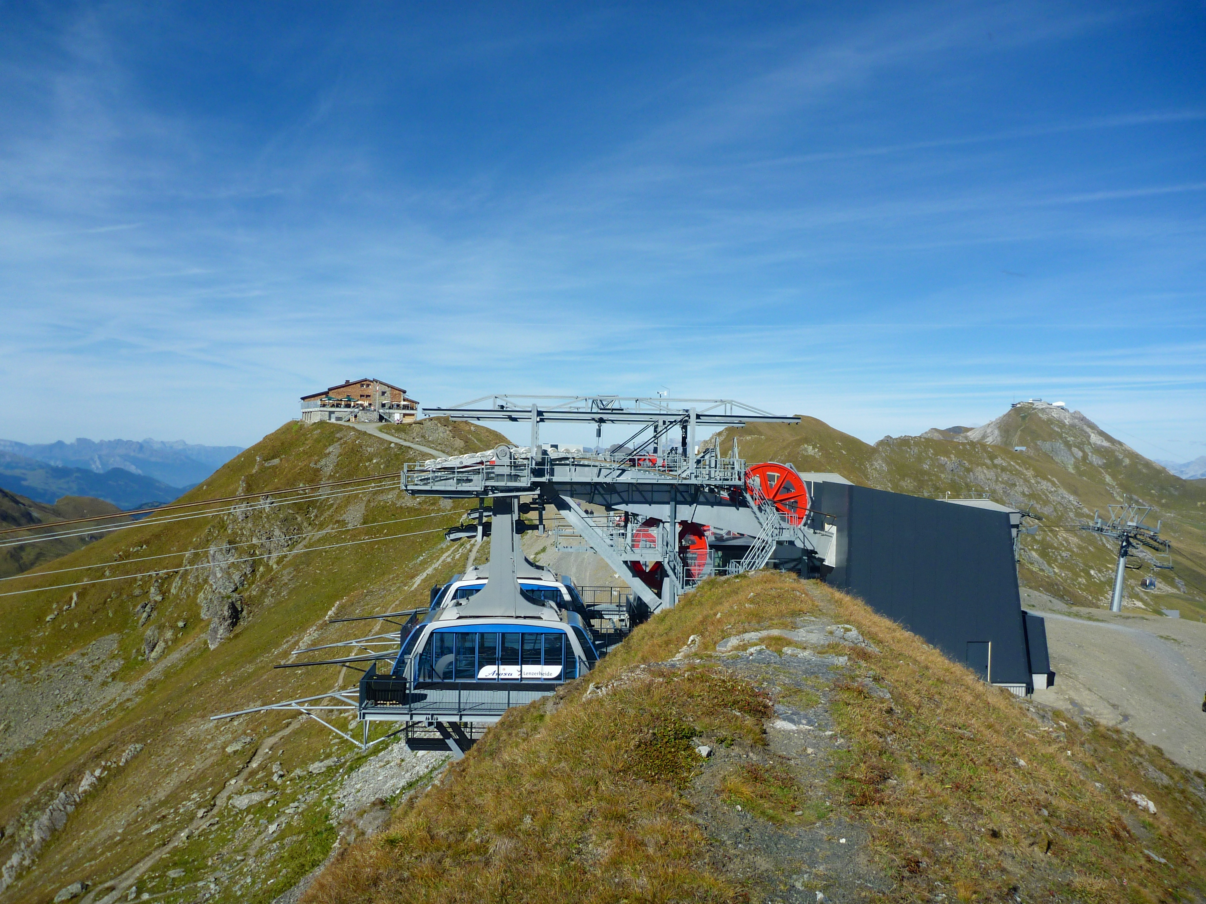 Die Urdenbahn, Station Hörnligrat, nach Abschluss der Feinarbeiten